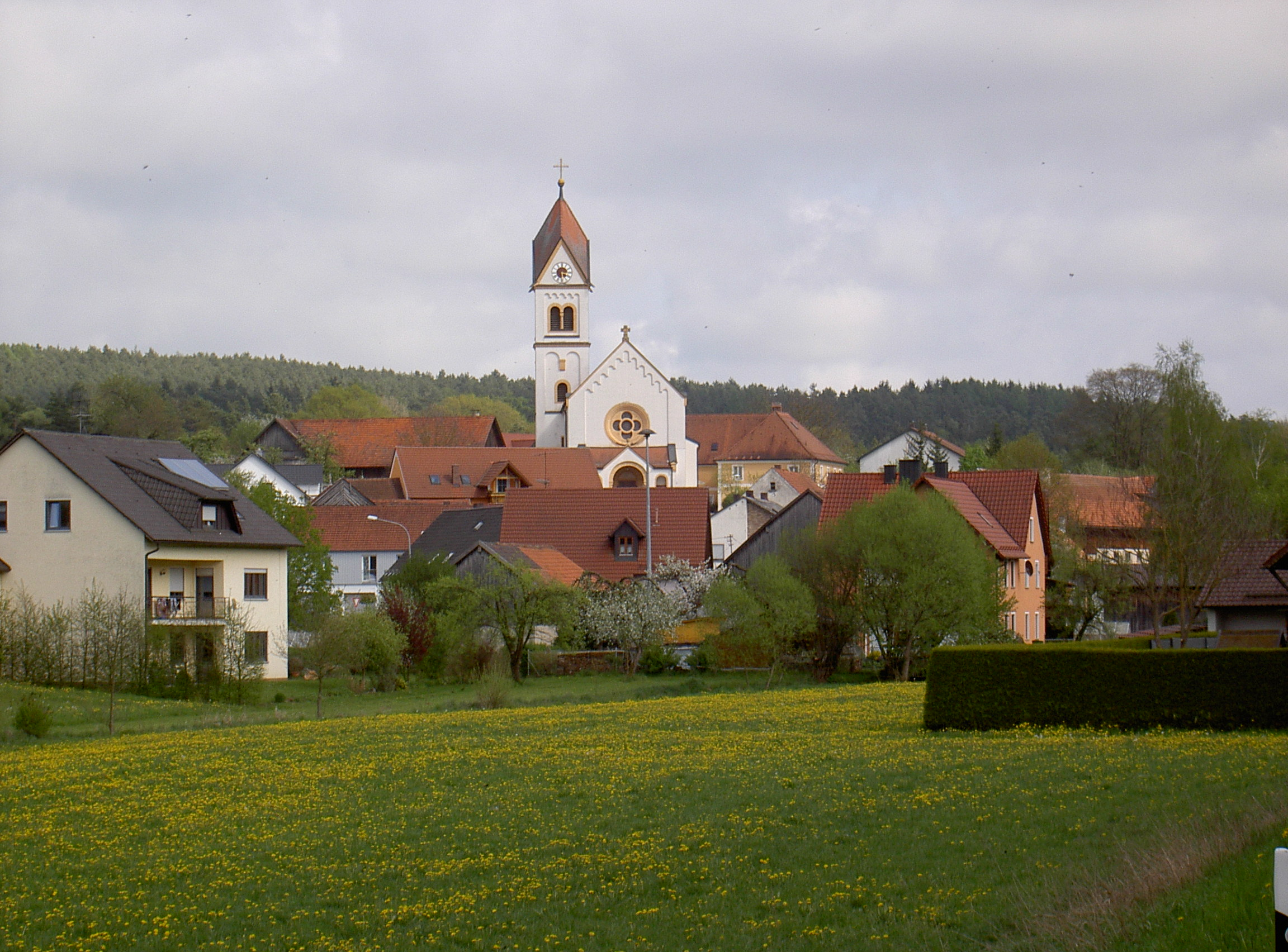 Unterauerbach Kirche St. Nikolaus